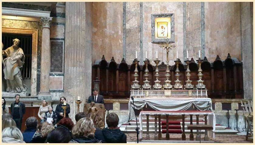 foto do maestro Jayme Amatnecks proclamando o dia mundial do canto coral no Panteão Romano.